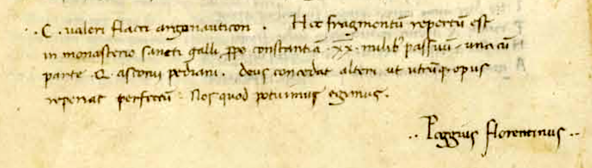 Asconius, guld, håndskrift